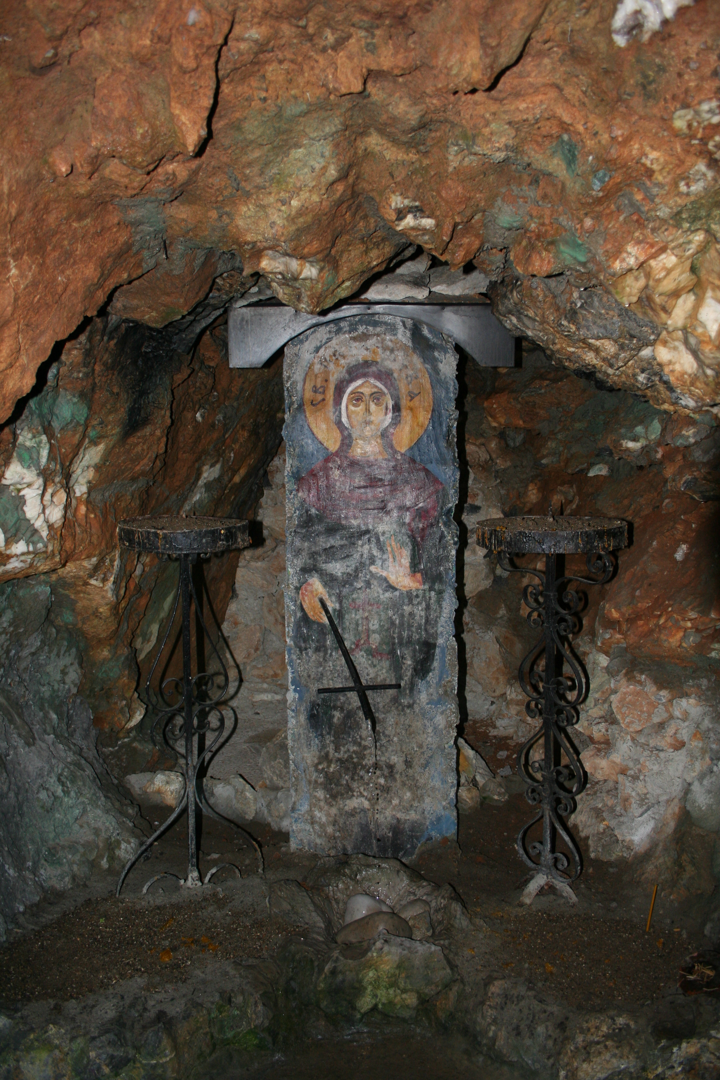 Kapela Svete Petke u Dobrom Potoku kod Krupnja